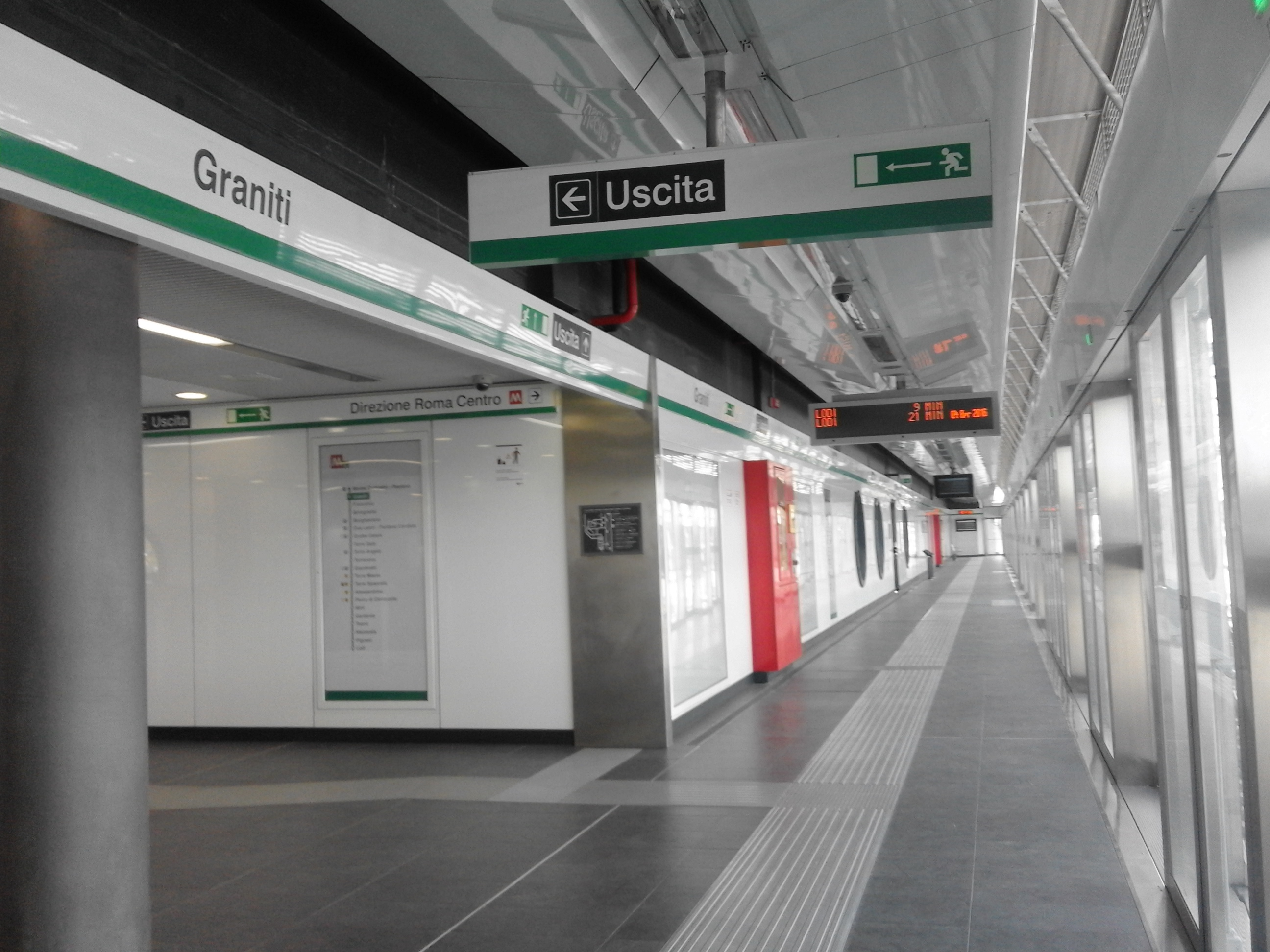 Metropolitana di Roma linea C - Graniti